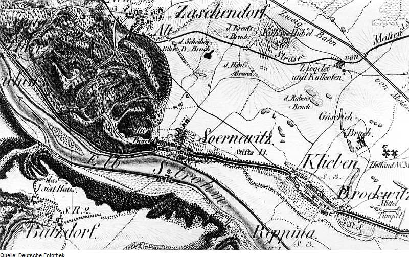 Original image description from the Deutsche Fotothek Coswig-Sörnewitz. Oberreit, Sect. Dresden, 1821/22